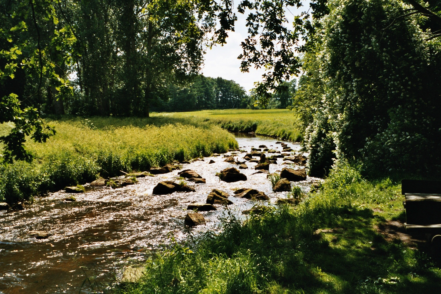 Mittelradde bei der Wind- und Wassermühle Hüven